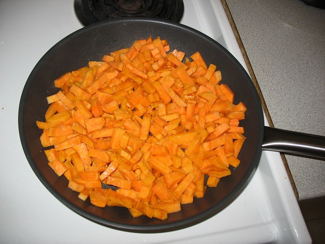 Жареный батат